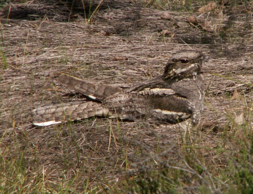 Ziegenmelker Caprimulgus europaeus in degrad. Hochmoor